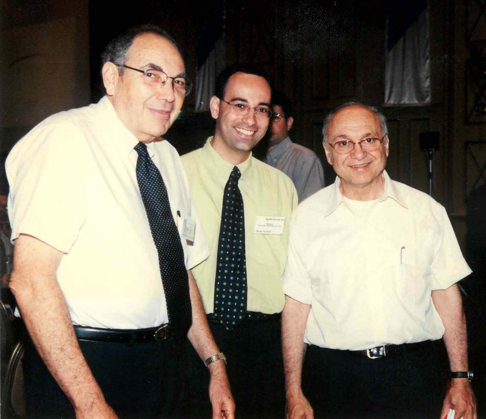 פרופ' מרשל סרנת